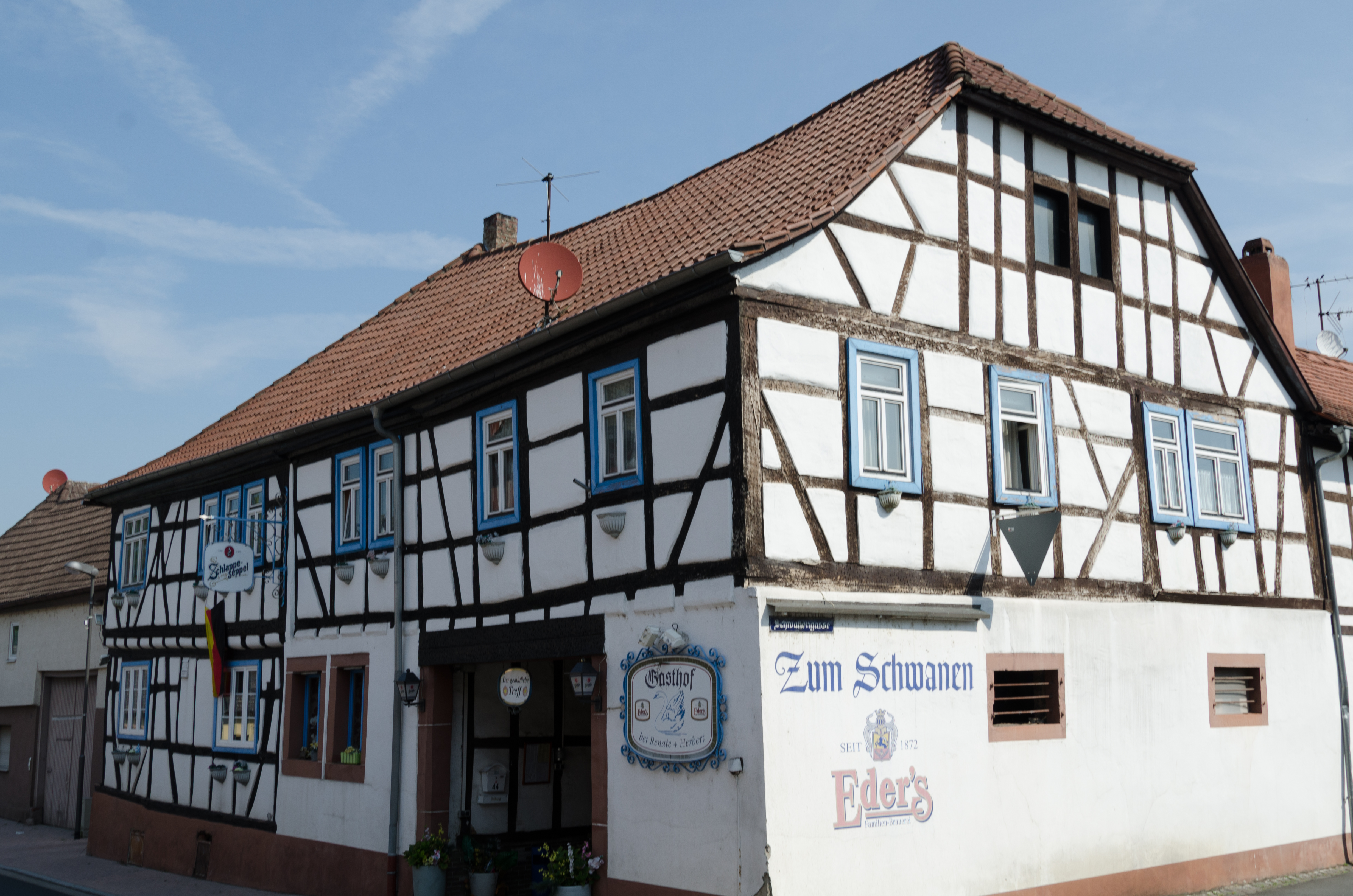 Hauptstraße 44 in Stockstadt am Main